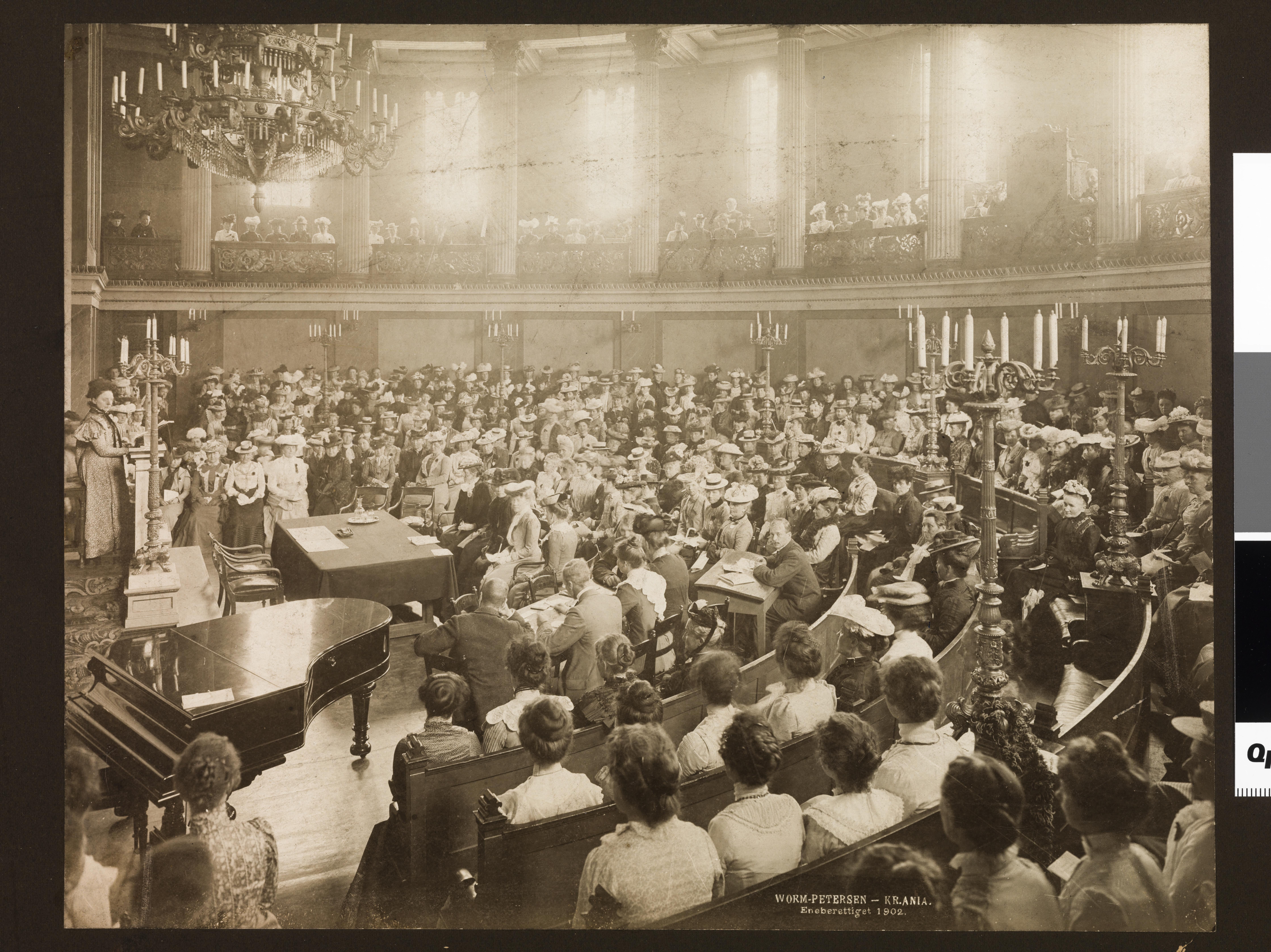 Bildet er hentet fra Nasjonalbibliotekets bildesamling. Anmerkninger til bildet var: Tittel hentet fra baksidetekst på komponentnr 1 Universitetets gamle festsal, Universitetet i Oslo, Oslo Depicted person: Qvam, Fredrikke Marie Depicted person: Krog, Gina Sverdrup